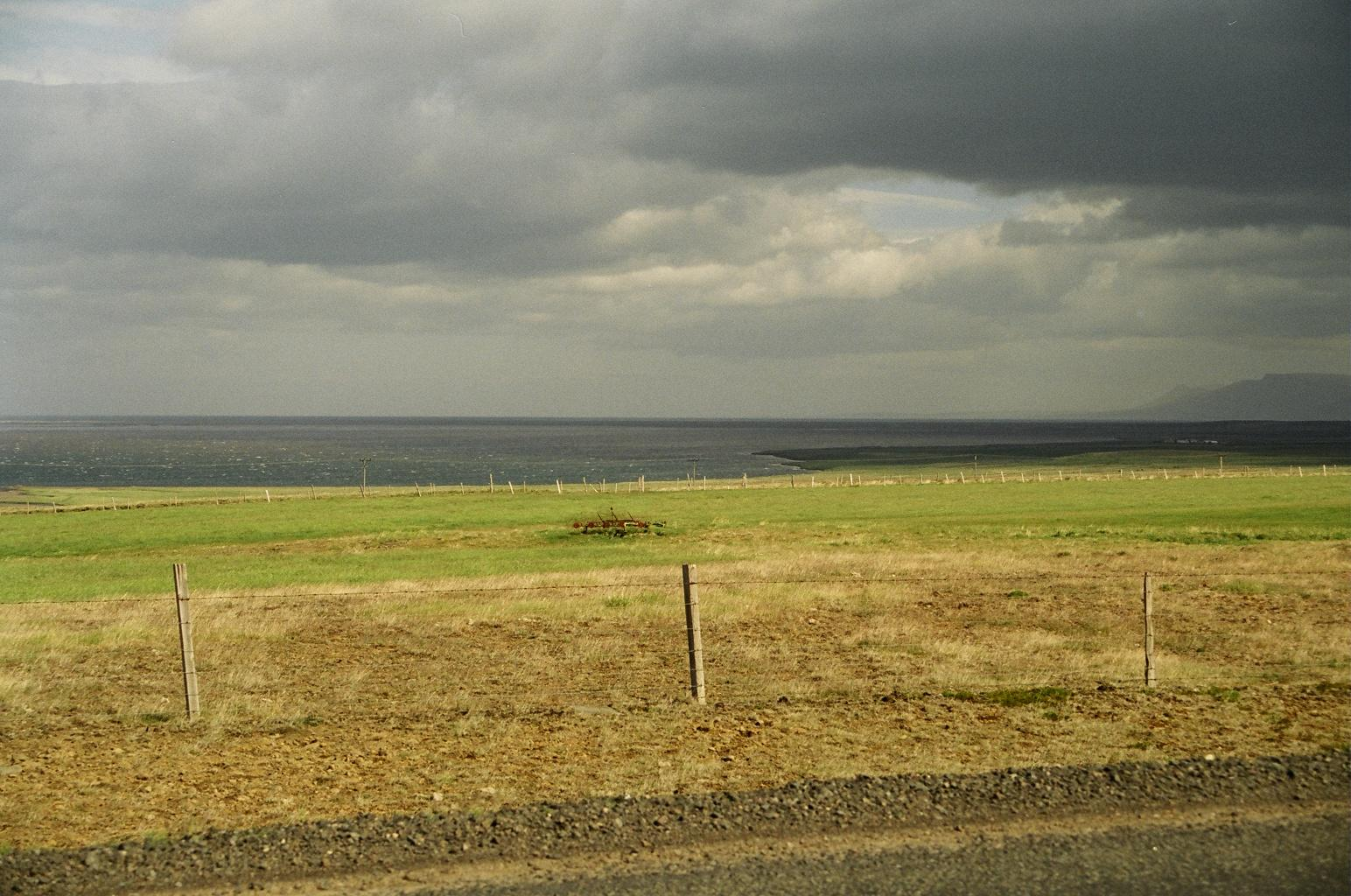 Das Bild zeigt den See Hóp in Nordisland nicht weit von der Þingeyrarkirkja.